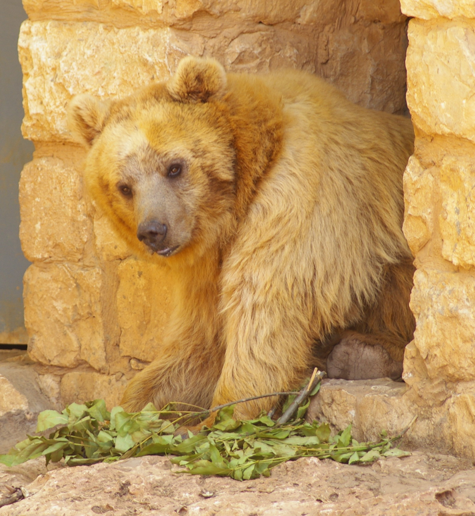 Syrian brown bear in the Zoo of Haifa, Israel